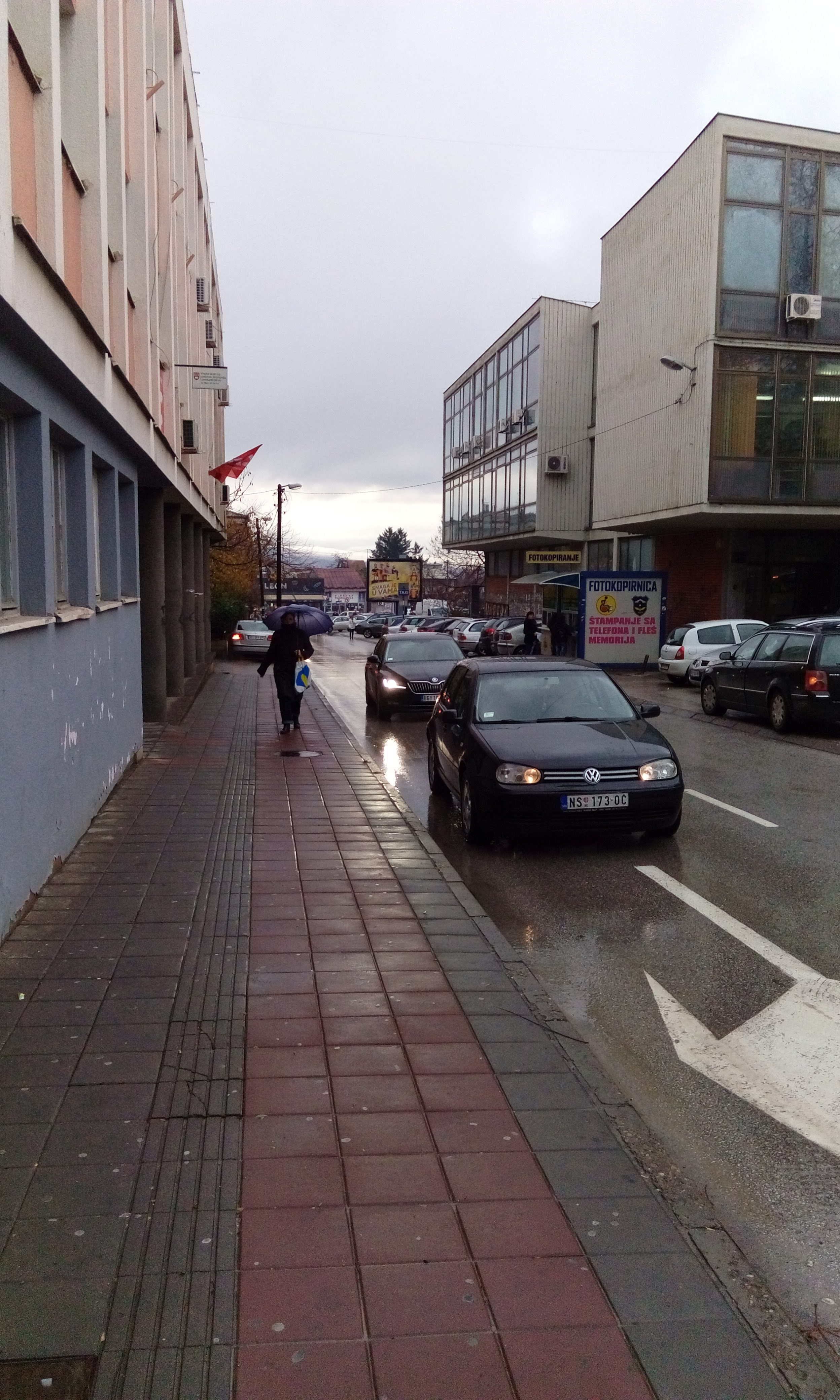 Поглед на улицу 29. новембар